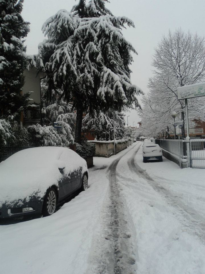 Neve a Roma nel febbraio 2012.